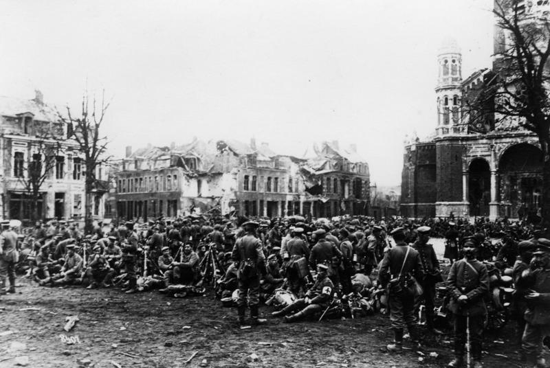 Rastende deutsche Truppen auf dem Place de la République in Armentières.